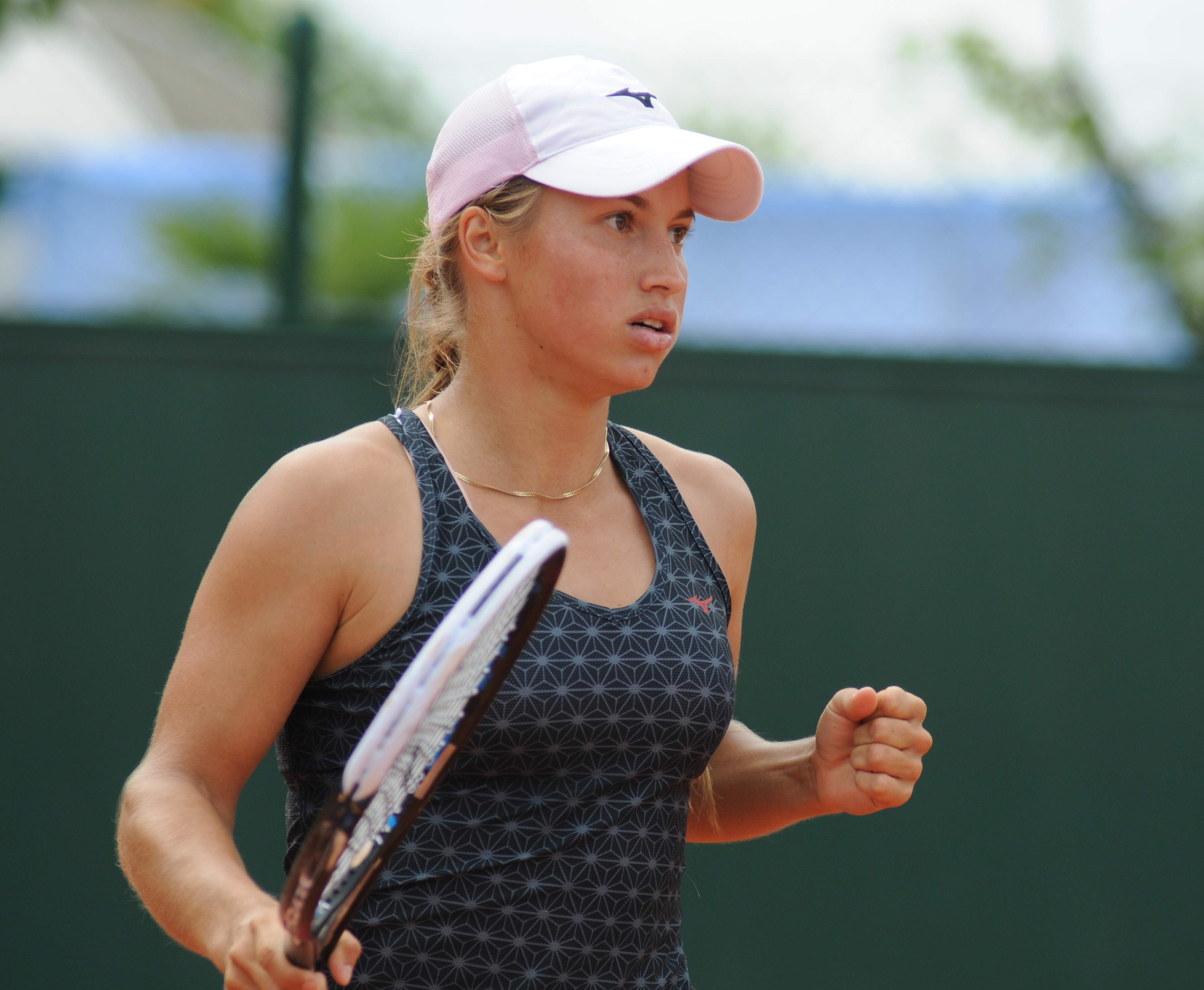 Yulia Putintseva